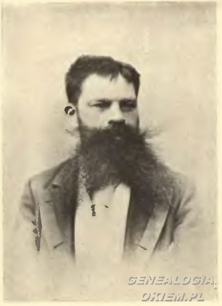 Romer Edward artysta, ur. 1848